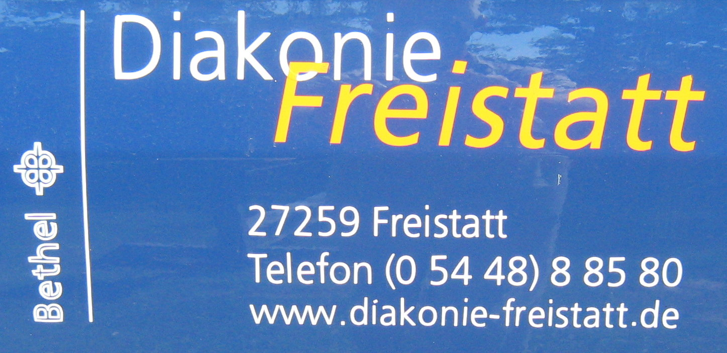 Adresse Diakonie-Freistatt 2010